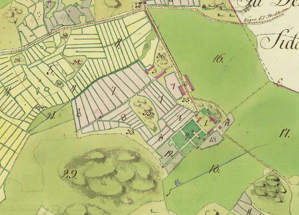 Farsta säteri på del av "Charta öfwer Farsta Sätesgård"